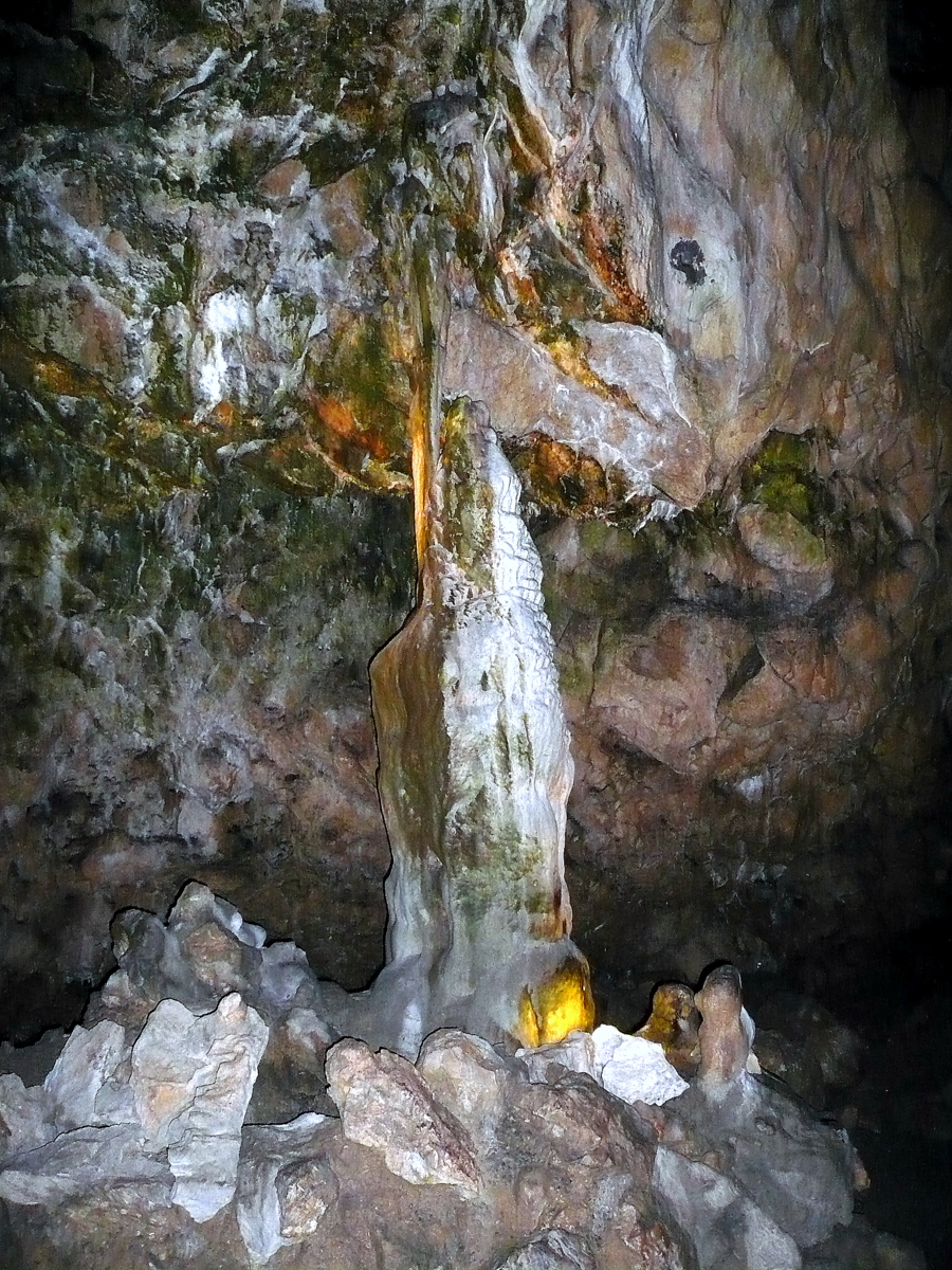 Charlottenhöhle